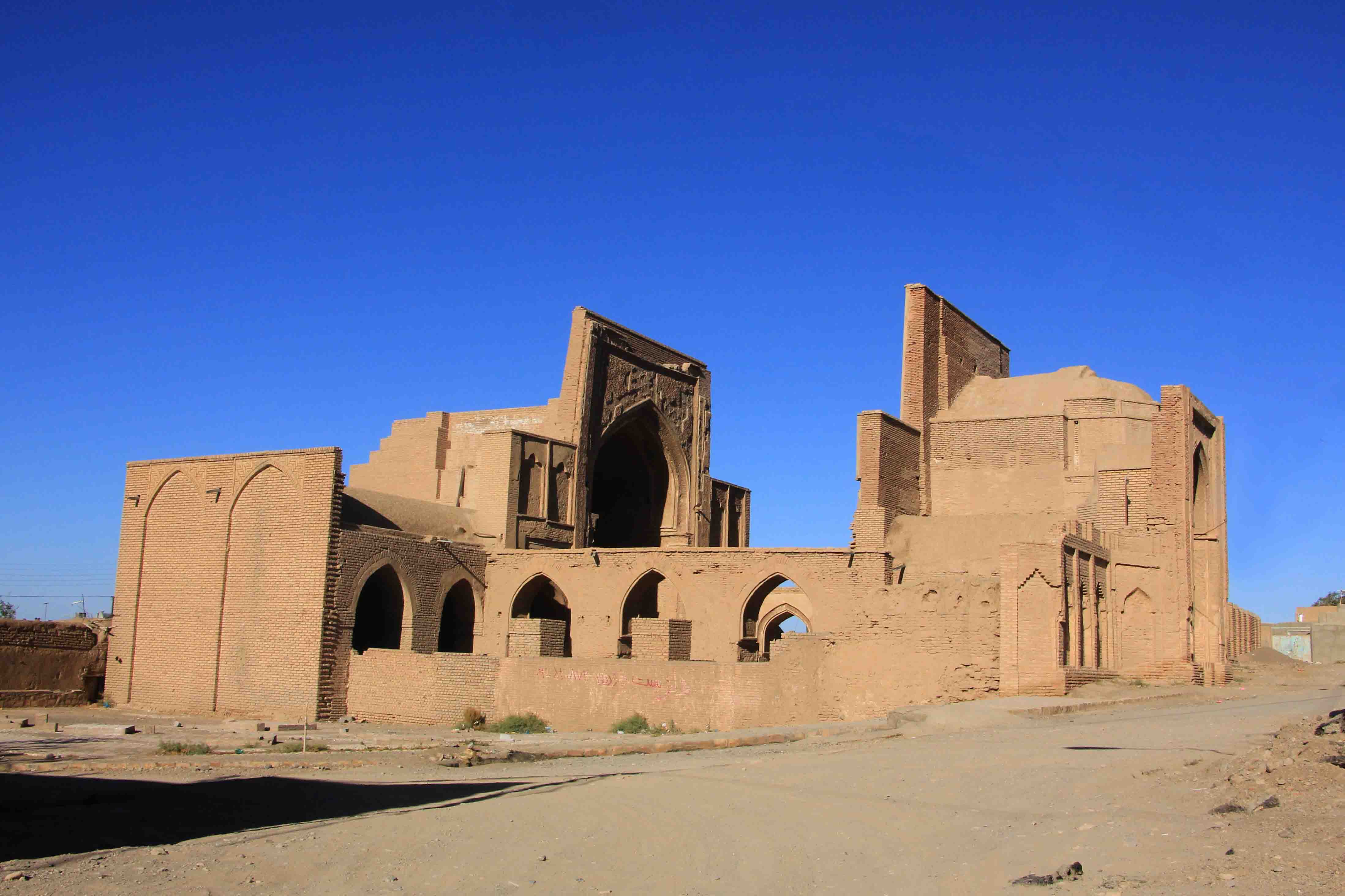 مسجد فرومد